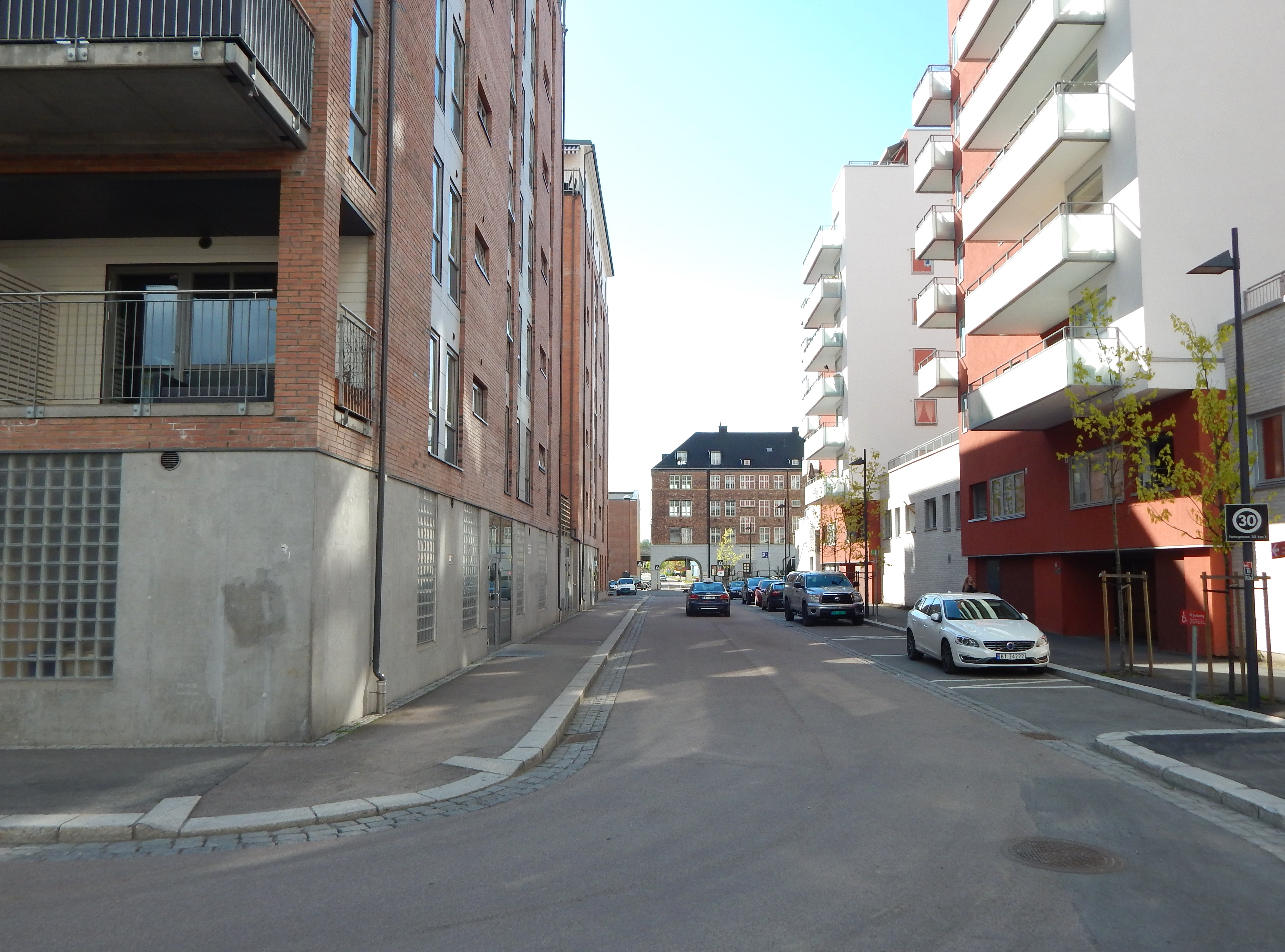 Turbinveien